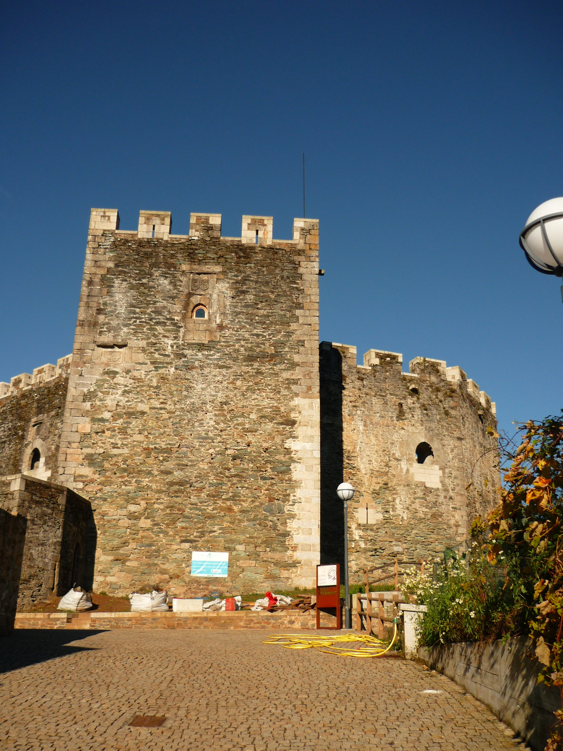 NO Concello do mesmo nome (provincia de A Coruña) NO Concello do mesmo nome (provincia de A Coruña)